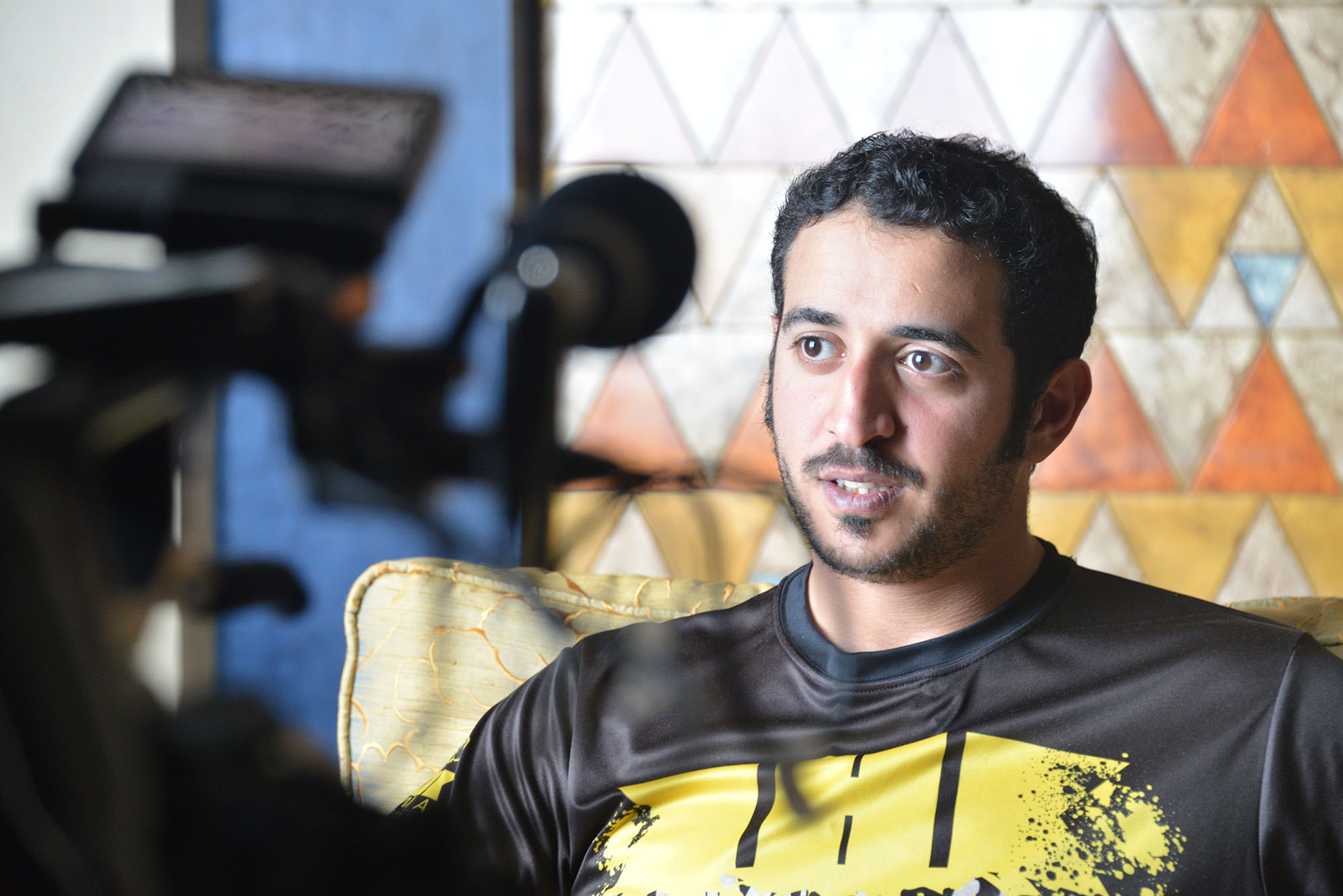 قناة فوكس سبورت التلفزيونية تجري لقاءاً مطولاً مع سمو الشيخ خالد بن حمد آل خليفة في فبراير 2016